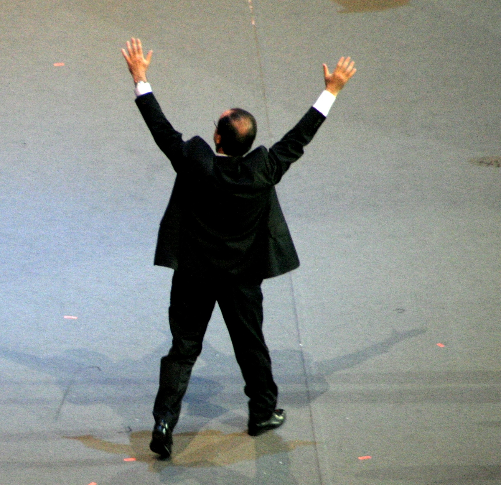 François Hollande (PS) arrive sur la scène du Palais Omnisports de Paris-Bercy pour son meeting le 29 avril 2012.